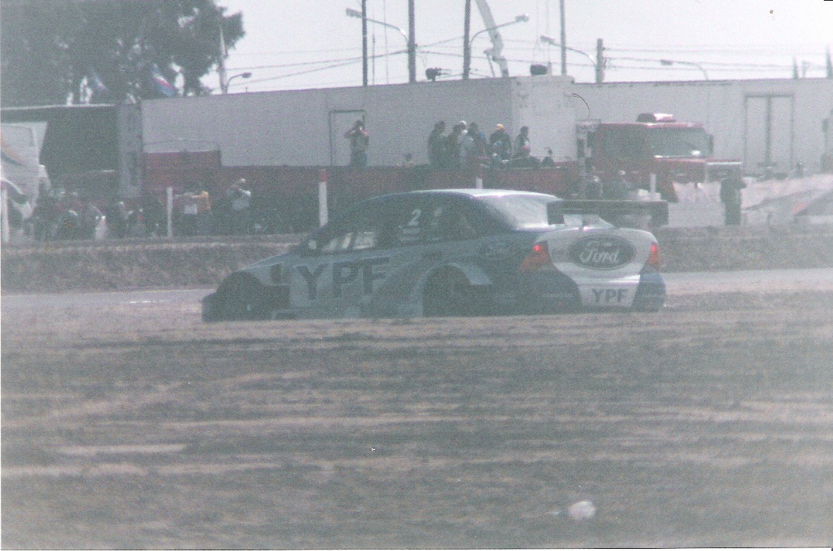 TC 2000 Martin Basso en San Martin, Mendoza